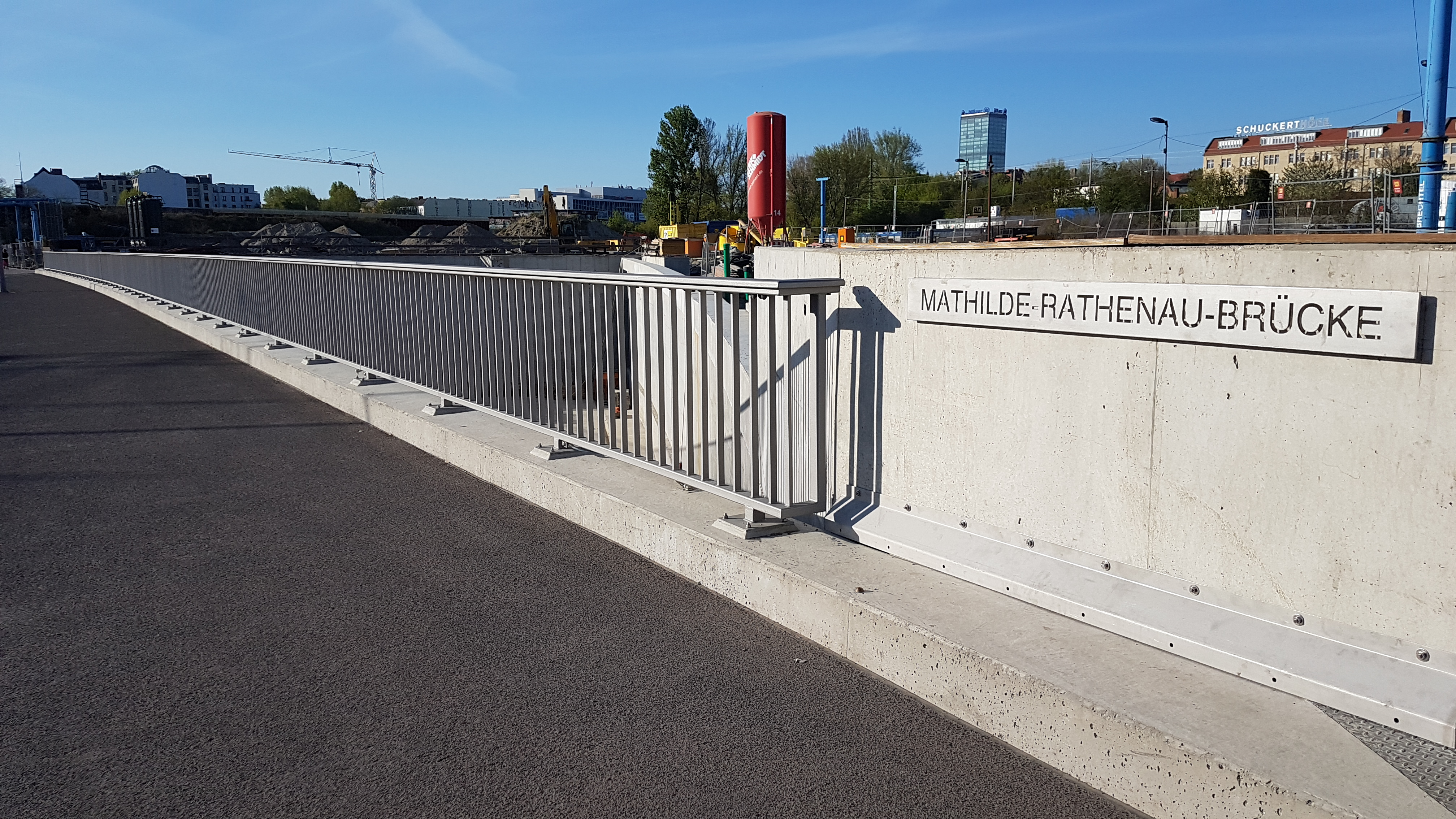 Die 2019 fertiggestellte Mathilde-Rathenau-Brücke in Berlin-Plänterwald, auf der die Kiefholzstraße die BAB 100 überquert. Der Bau der Brücke wurde durch den 16. Bauabschnitt der BAB 100 notwendig, der vom Autobahndreieck Neukölln zum Treptower Park führt. Blickrichtung Norden, im Hintergrund rechts das Hochhaus der Treptowers.